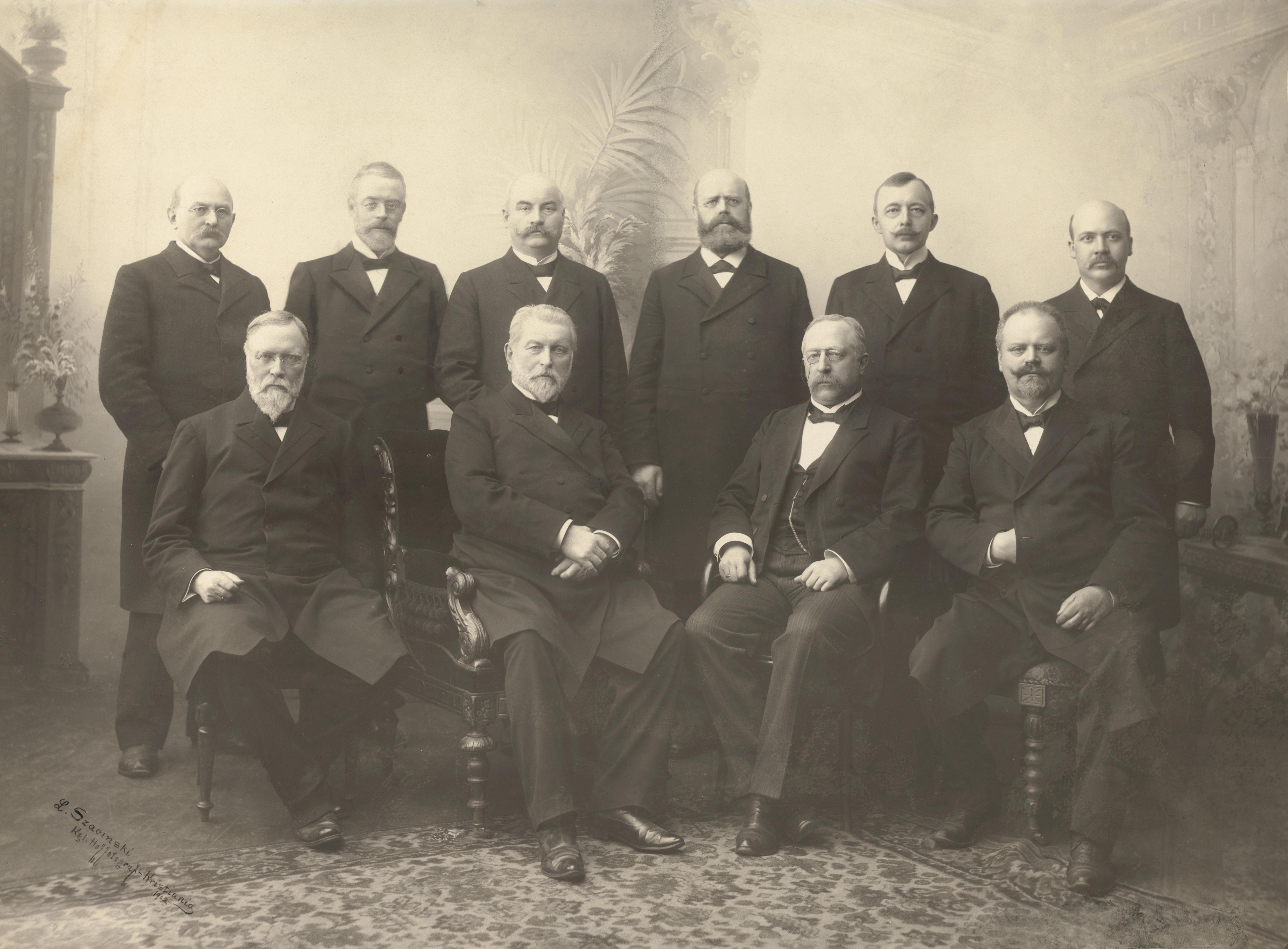 Bildet er hentet fra Nasjonalbibliotekets bildesamling Depicted person: Løvland, Jørgen Gunnarson Depicted person: Konow, Wollert H. Depicted person: Knudsen, Gunnar Depicted person: Steen, Johannes Vilhelm Christian Depicted person: Stang, Georg Depicted person: Qvam, Ole Anton Depicted person: Wexelsen, Vilhelm Andreas Depicted person: Behr, Otto Albert Depicted person: Sunde, Elias Depicted person: Årstad, Søren Tobias